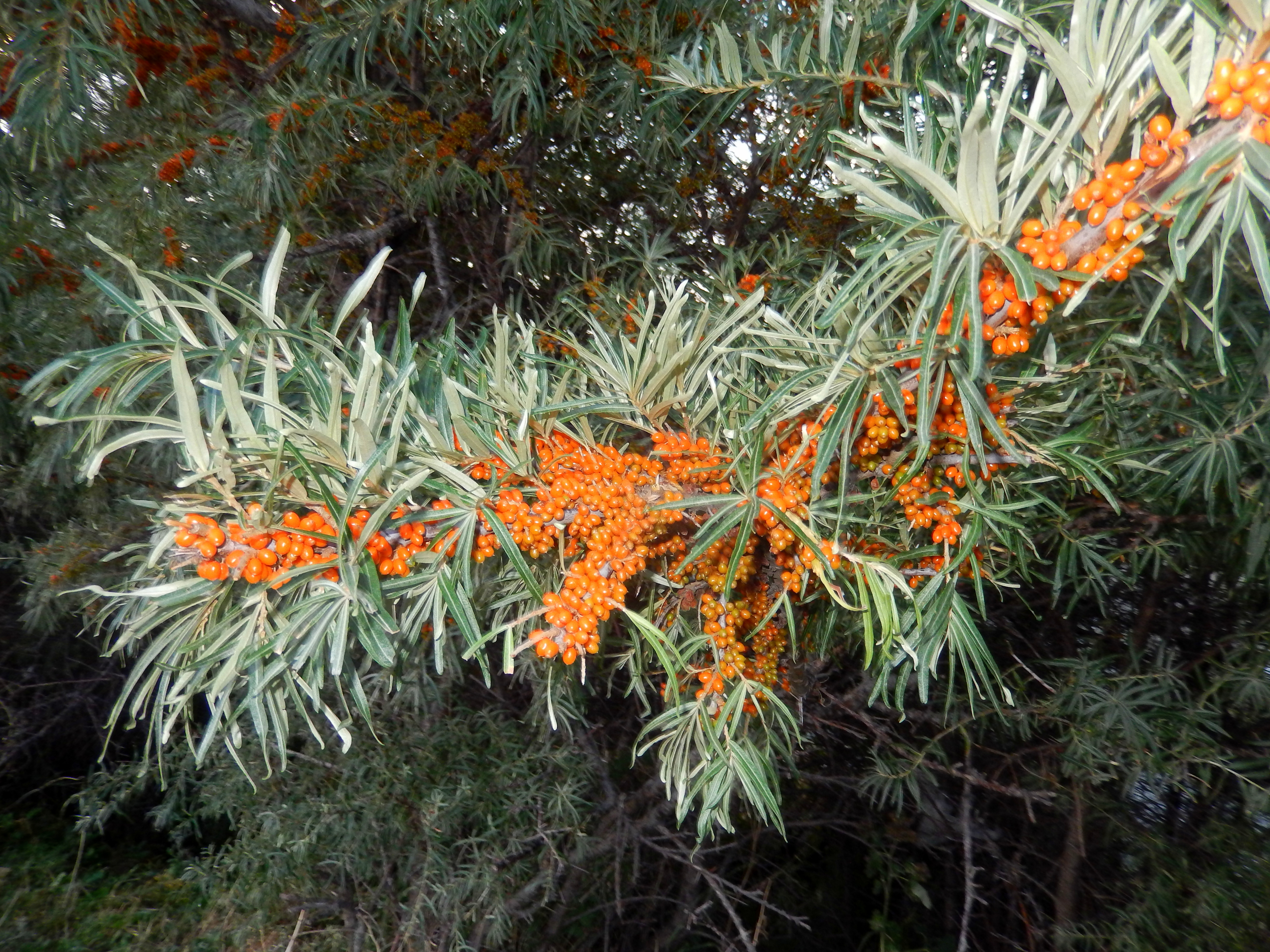 Շորժա, չիչխան